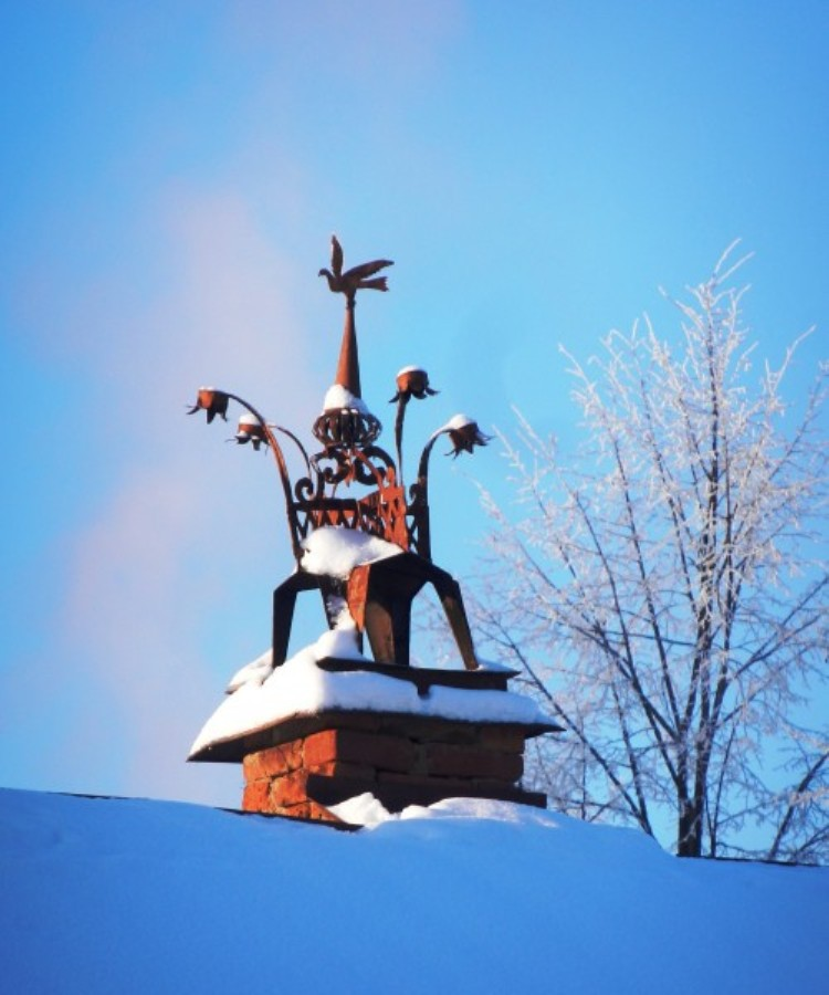 Характерный для Тотьмы дымник — украшение печной трубы